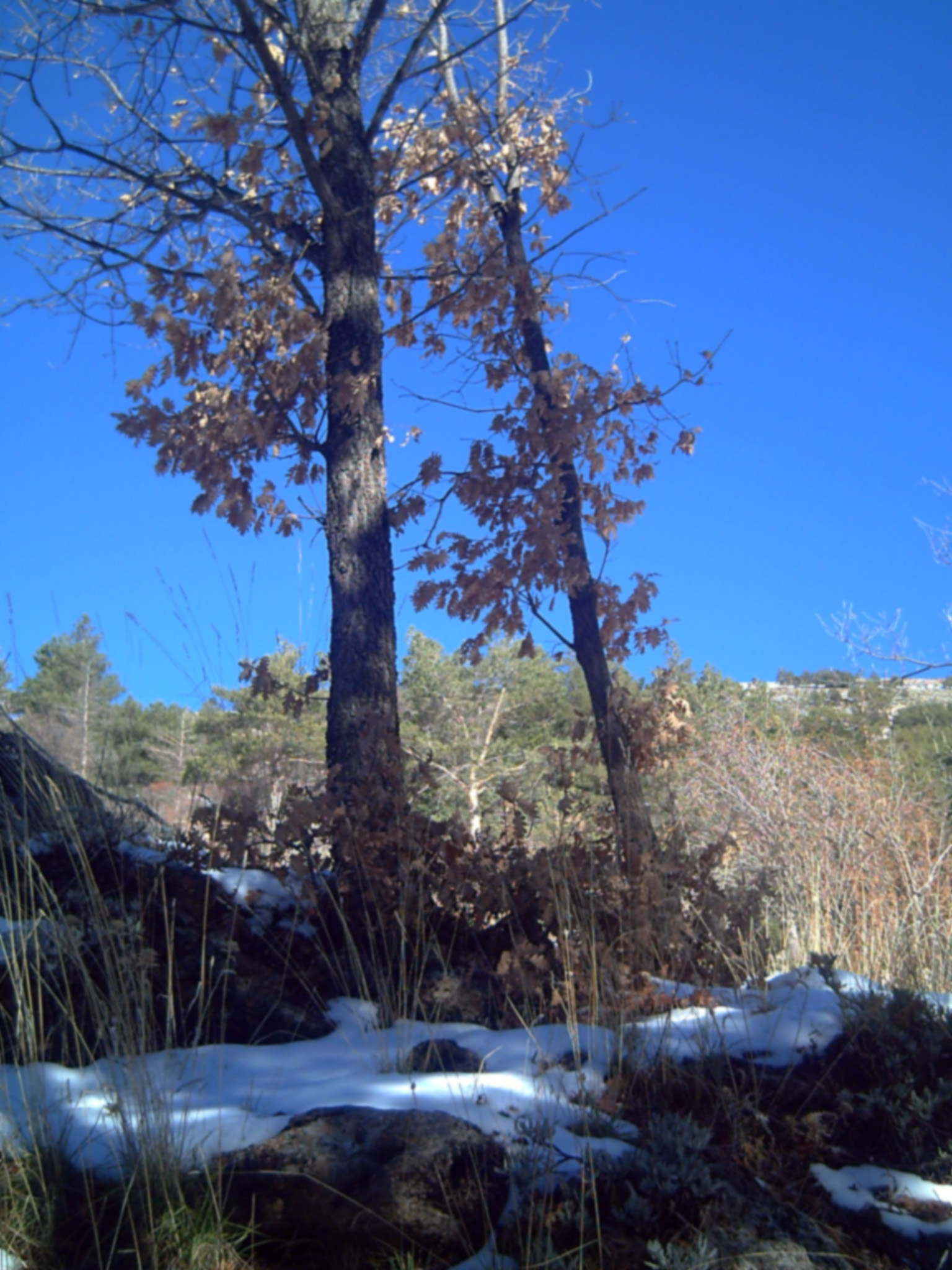 Hoya de Pedraza Botanical Garden in Sierra Nevada (Spain) Quercus pyrenaica